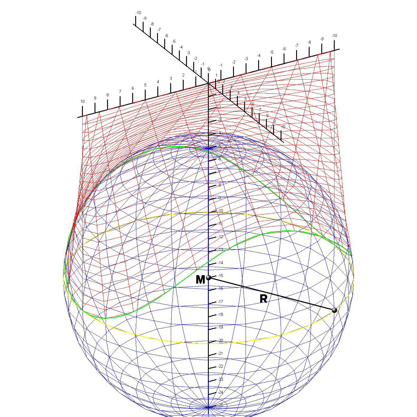 Een afbeelding van de rechte bolconoïde met hulpconstructies